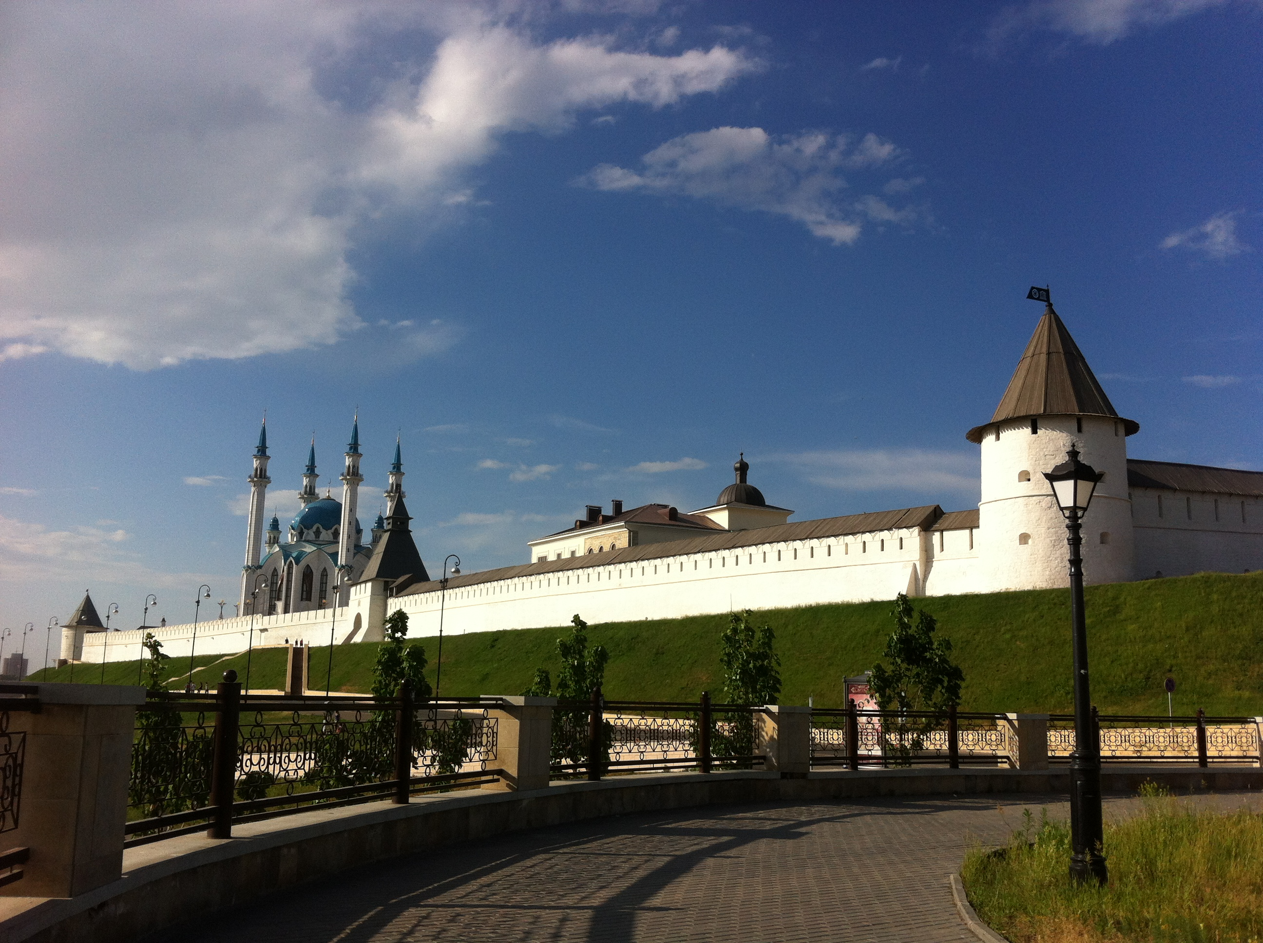 Башня юго-западная (Республика Татарстан, Казань, Кремль)